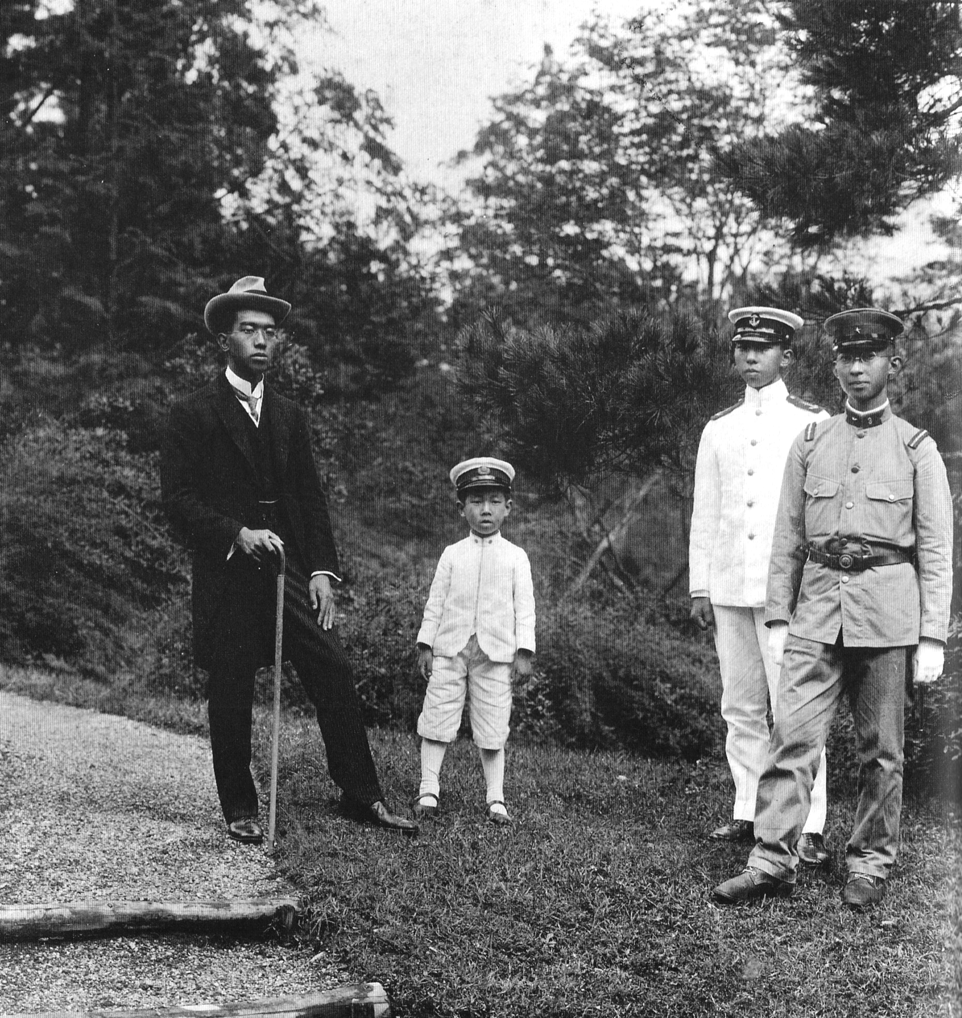 大正天皇の皇子たち。左から、裕仁親王（昭和天皇 Hirohito）、崇仁親王（三笠宮 Takahito）、宣仁親王（高松宮 Nobuhito）、雍仁親王（秩父宮 Yasuhito）